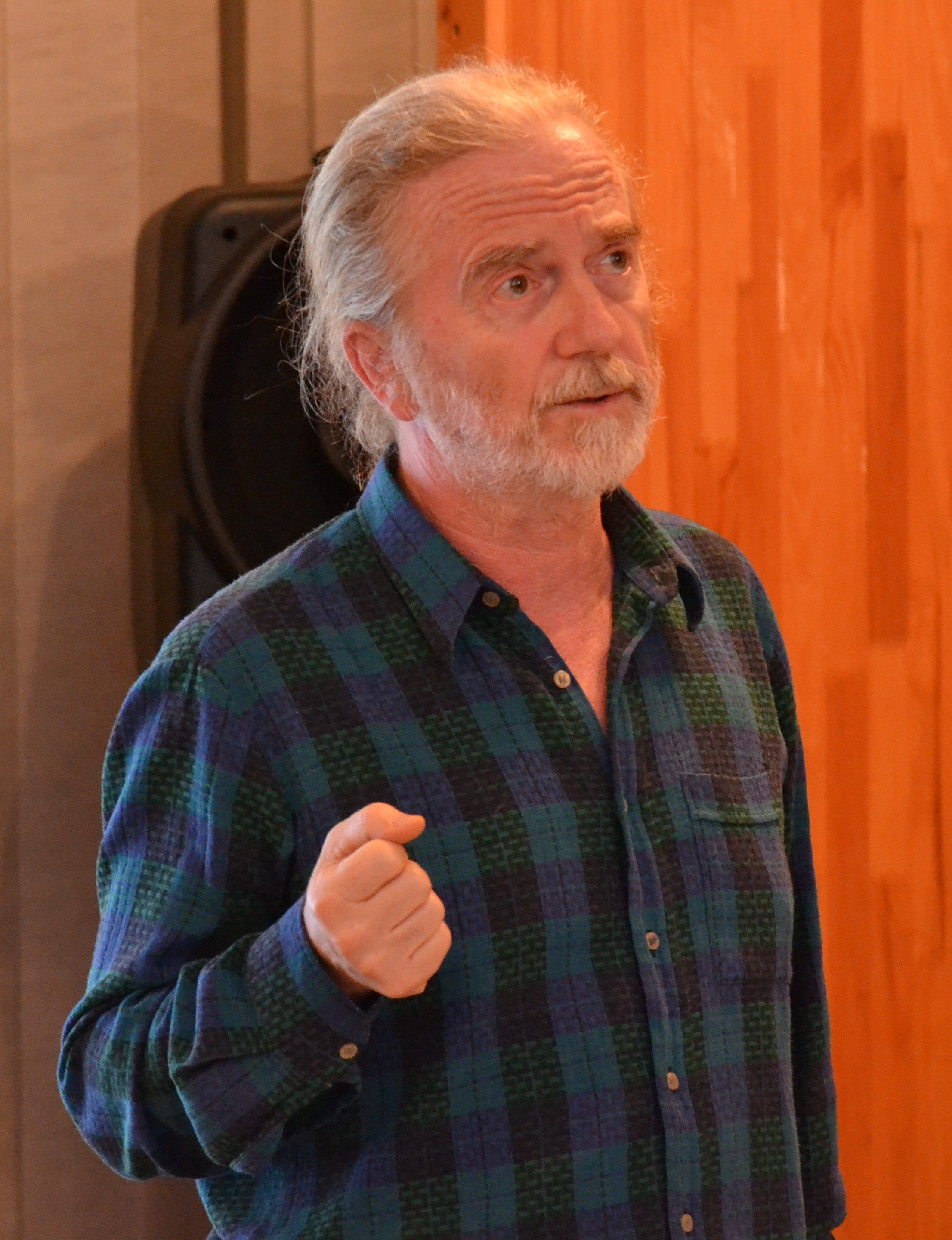 Szkárosi Endre (eredeti neve: Horváth Endre) (Budapest, 1952. május 28. –) József Attila-díjas (2007) magyar költő, művészeti író, műfordító, kritikus, irodalomtörténész, az ELTE egyetemi tanára.